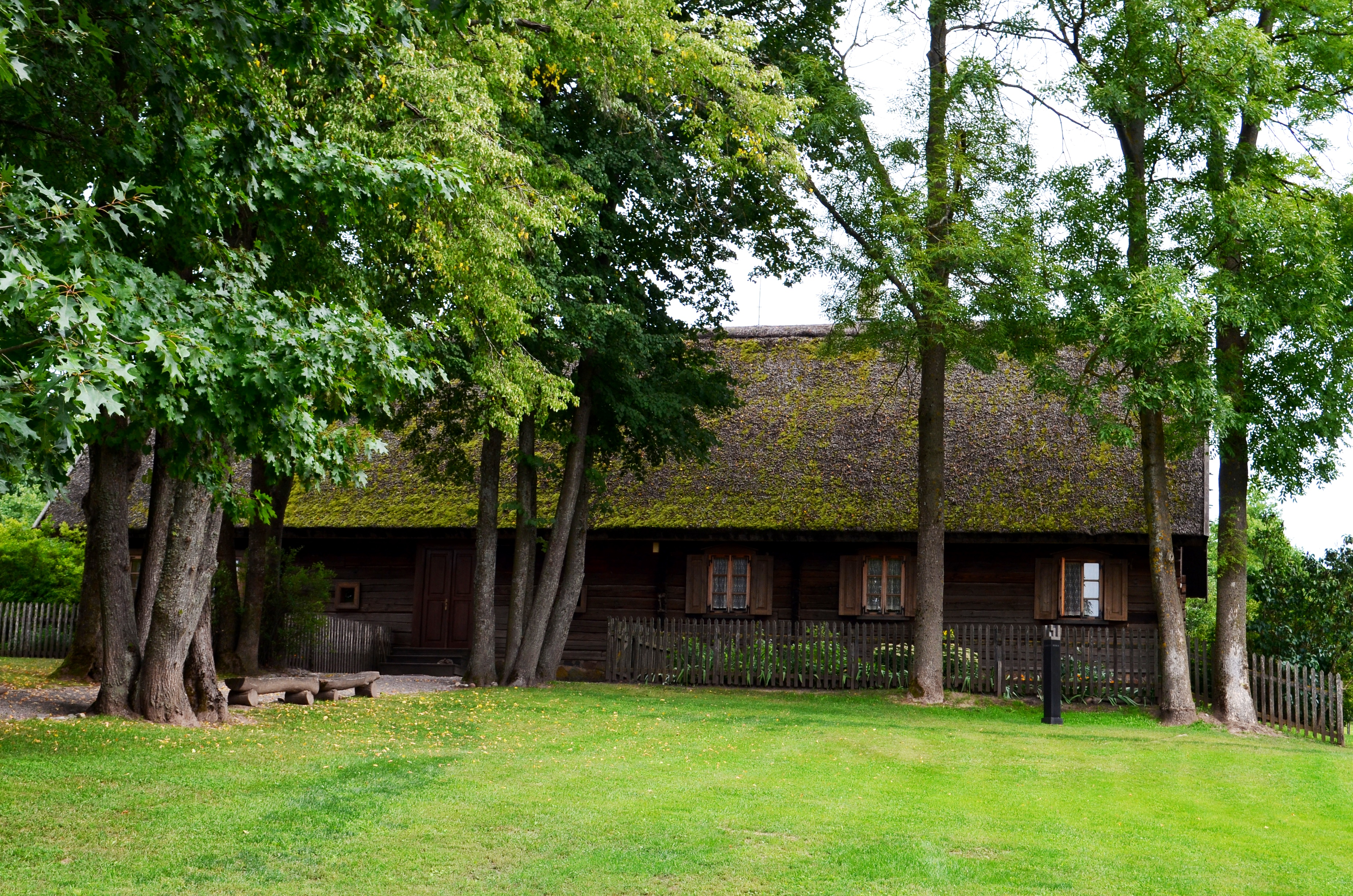 J. Basanavičiaus sodyba, Ožkabaliai, Bartninkų sen., Vilkaviškio raj.